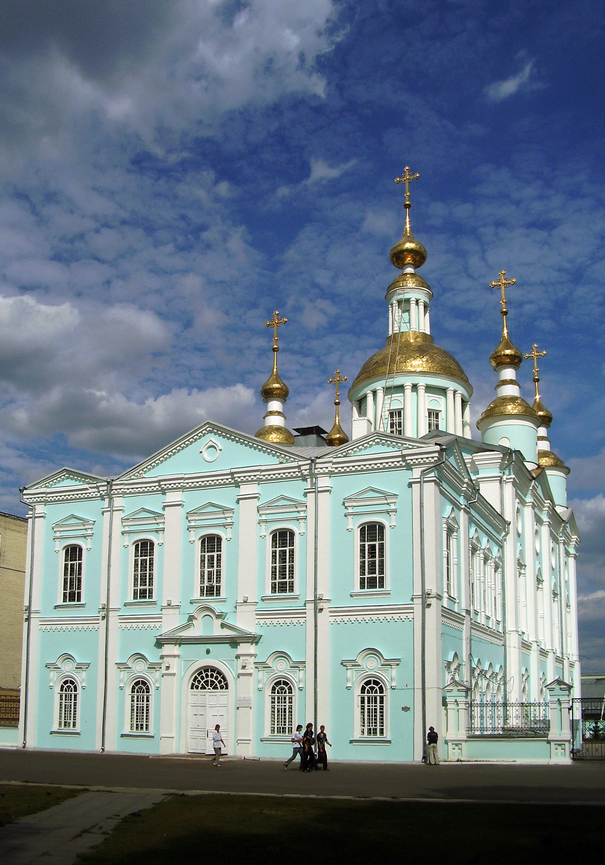 Тамбов,Спасо-Преображенский собор